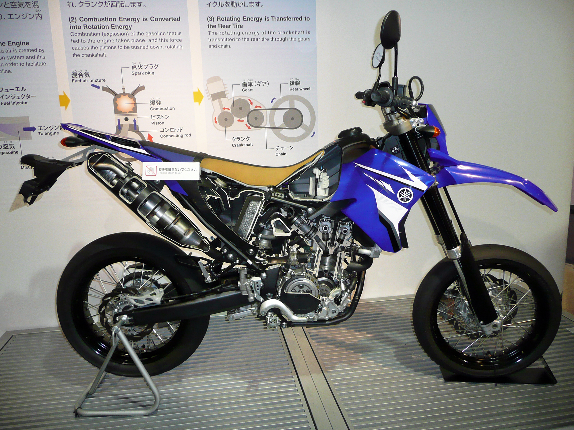 バイクのカットモデル ヤマハコミュニケーションプラザにて撮影